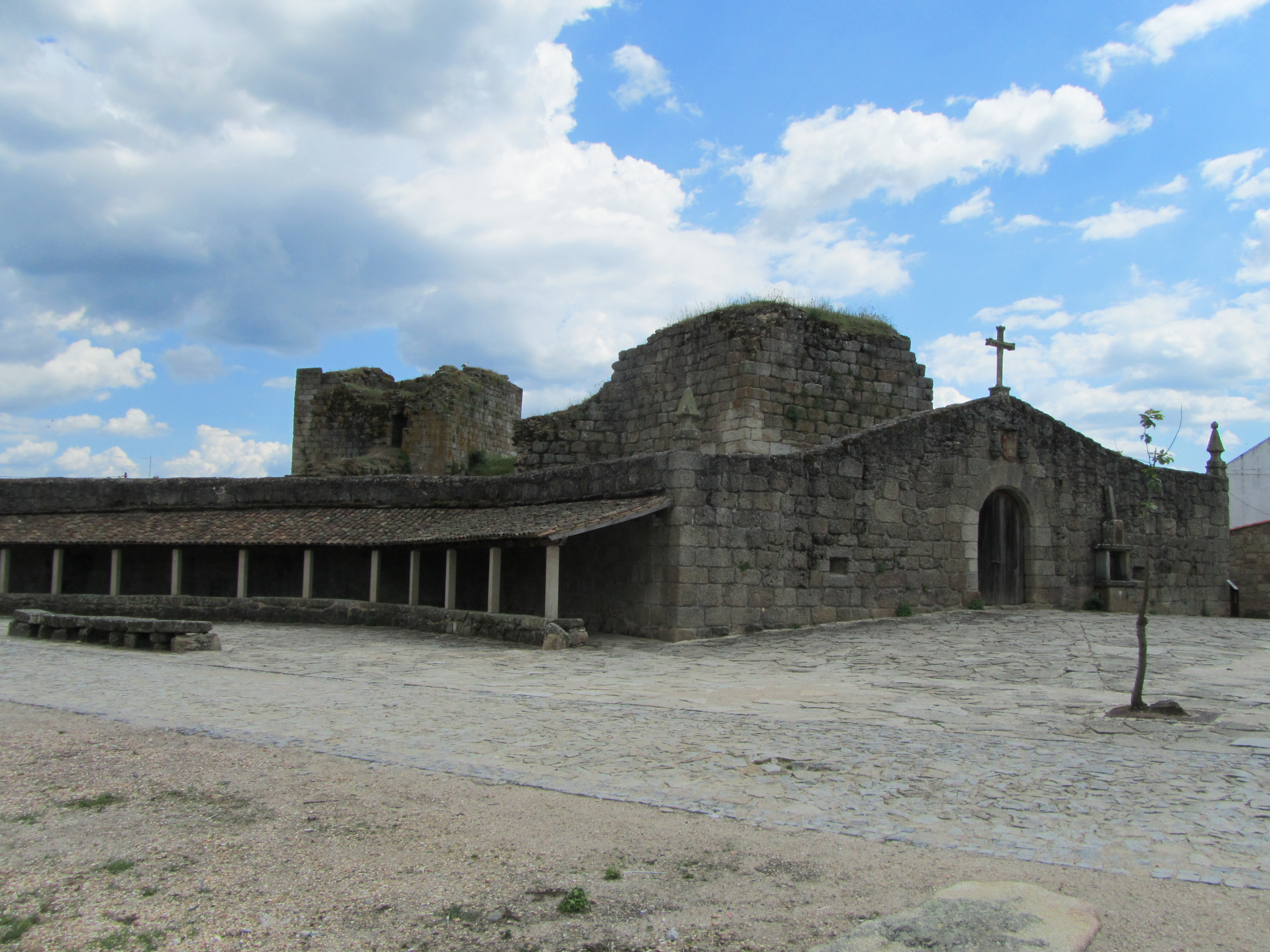 Castelo de Alfaiates